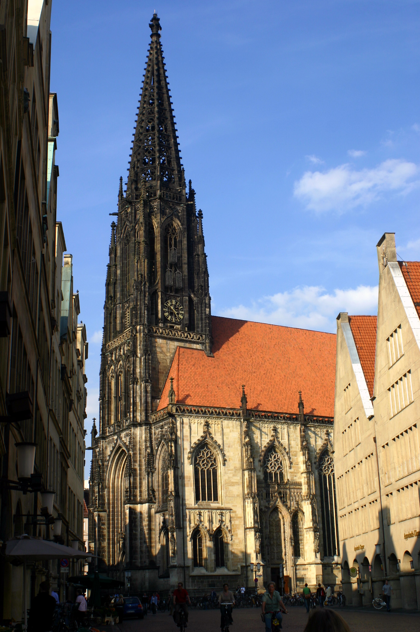 Münster, St. Lamberti